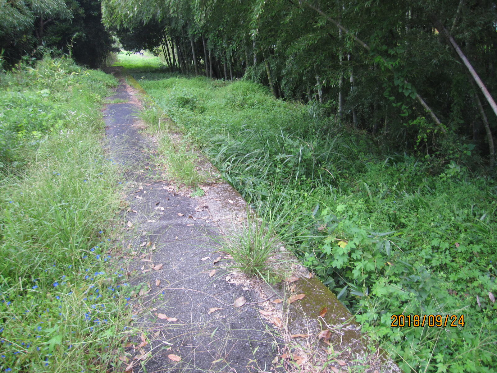 2018年現在の西山野駅のホーム。